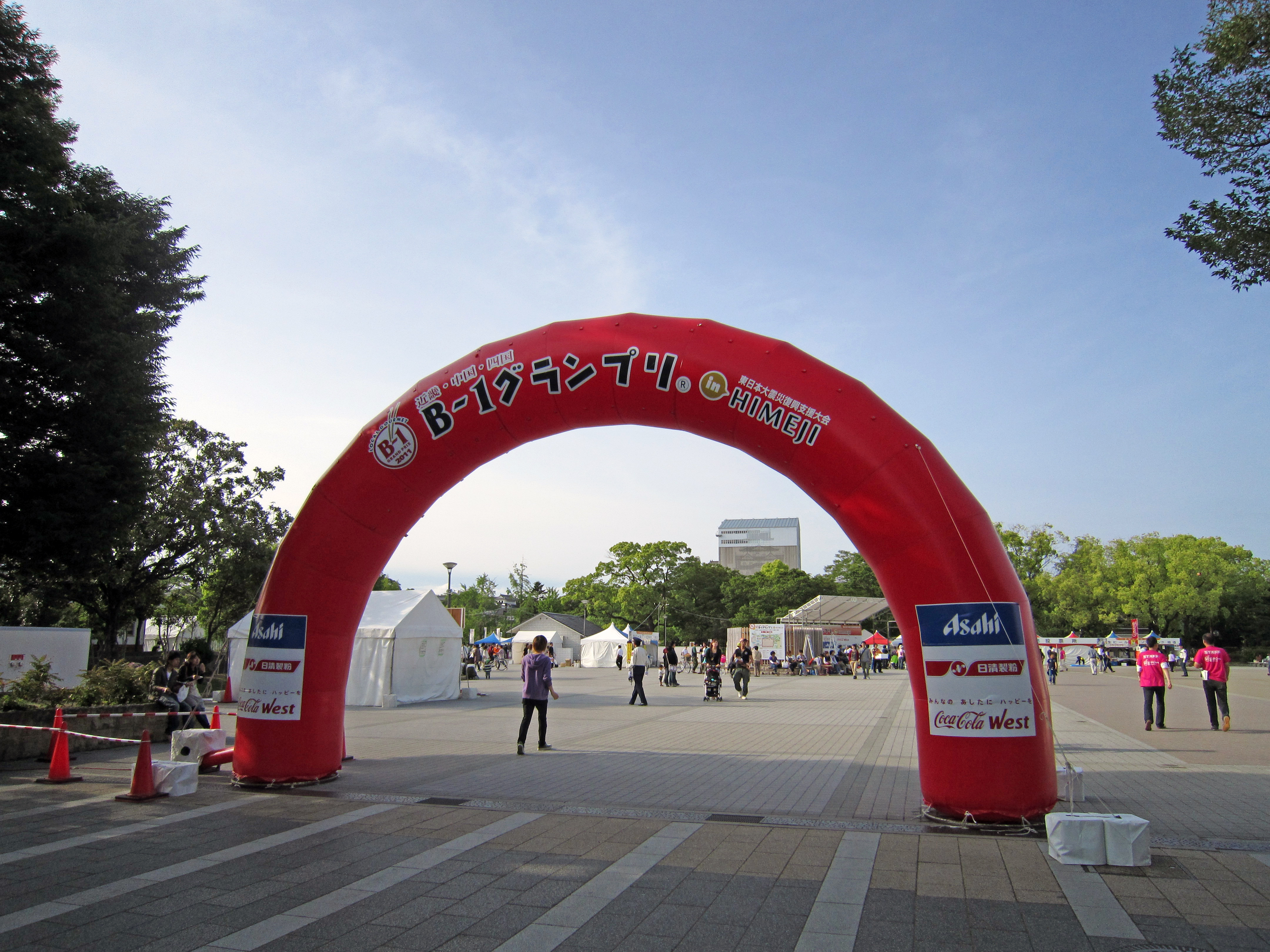 2011年5月21日・22日に姫路城南部周辺にて開催された姫路B-1グランプリの様子。